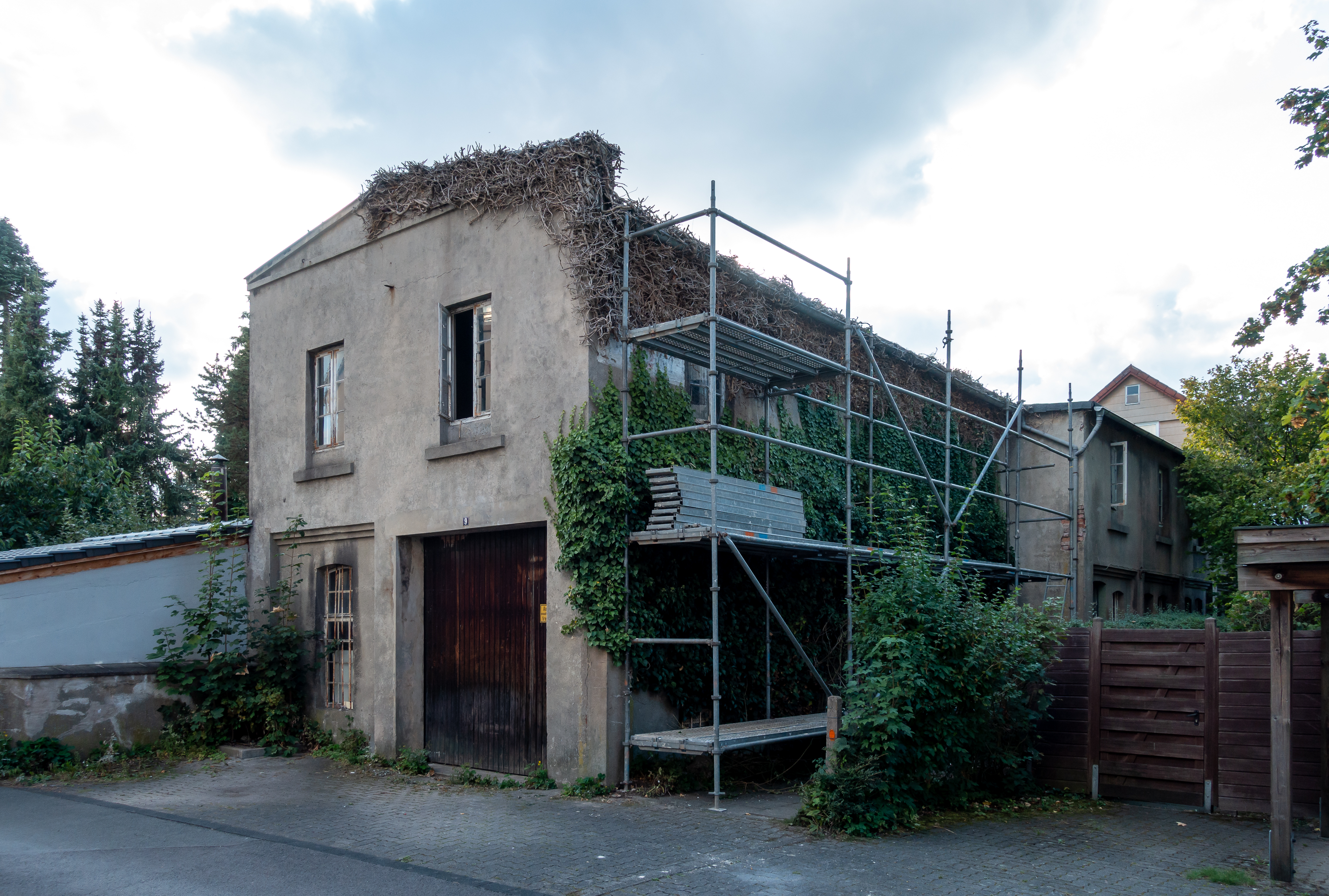 Werkstattgebäude des Bildhauers Albert Lauermann aus dem Jahr 1894